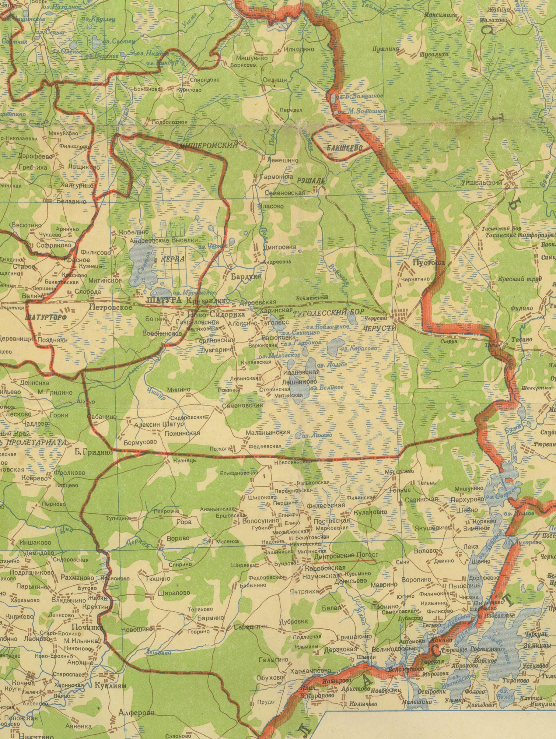 Территория Шатурского района в 1939 году